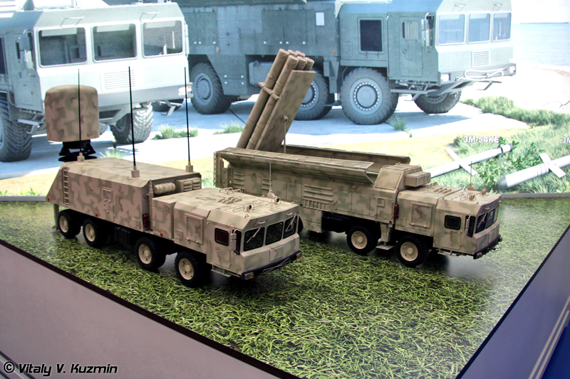 Береговой комплекс ракетного оружия Club-M (Coastal missile system Club-M)